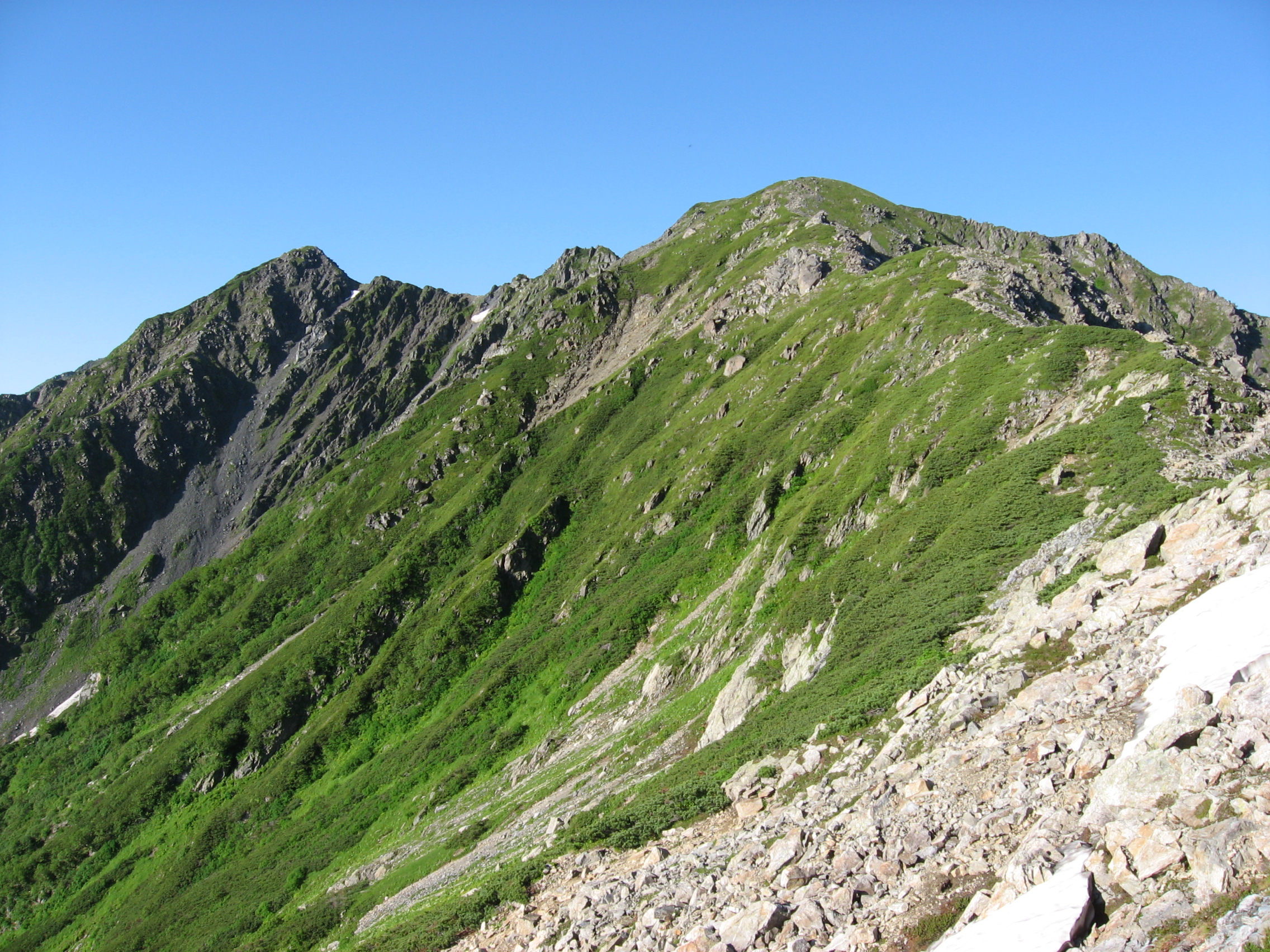 北岳山荘付近より望む中白根山